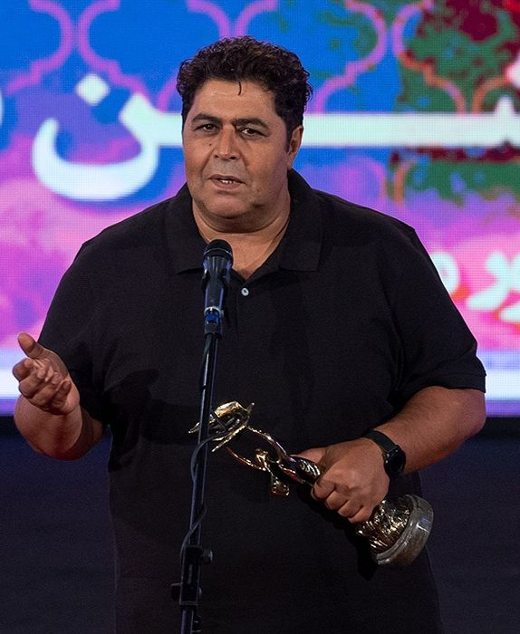 فرهاد اصلانی در بیست و یکمین جشن سینمای ایران - شهریور ۱۳۹۸